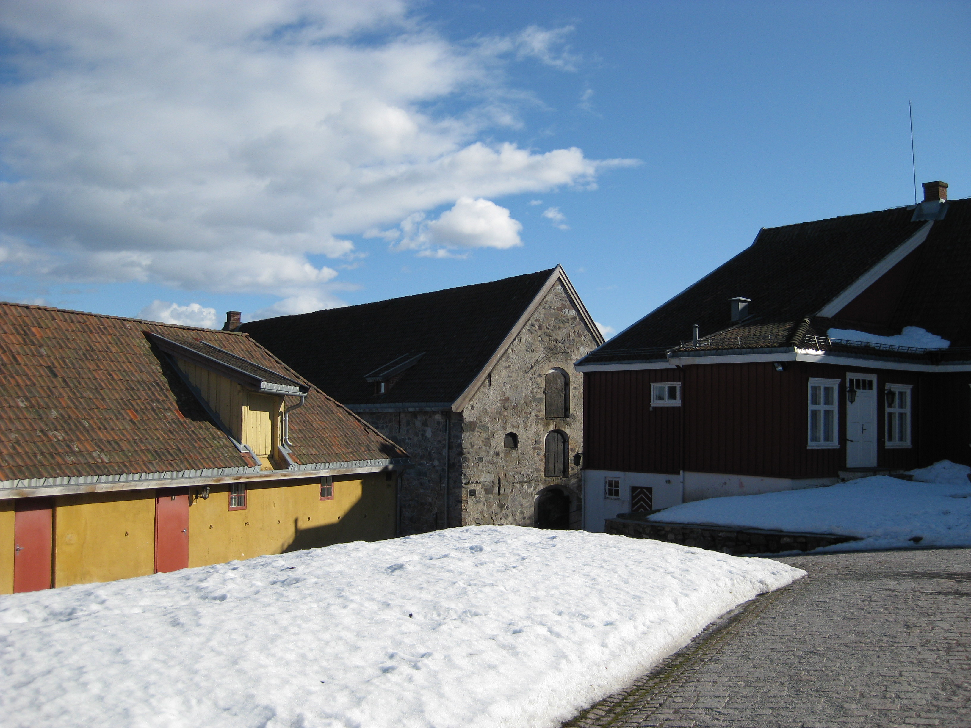 Kongsvinger festning. Fra venstre: Kommandantens stall og fehus (1743), Provianthuset (1682) og Kommandantboligen (1683).